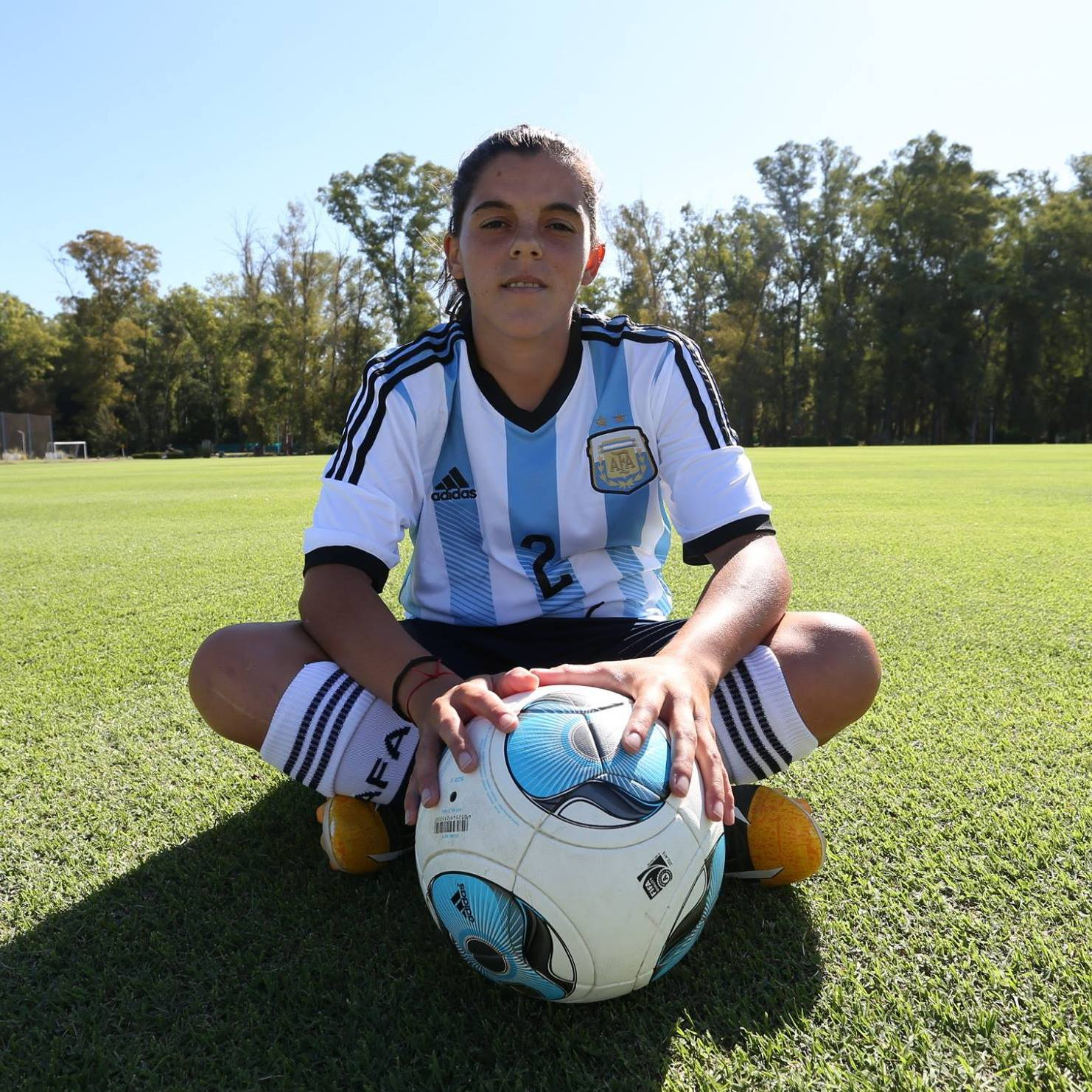 Florencia con la camiseta de la Selección Argentina.